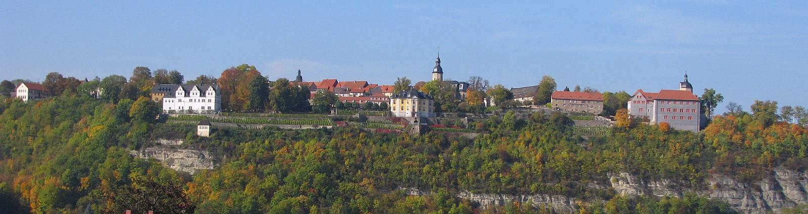 Dornburg Saale Dornburger Schlösser Renaissanceschloss Rokokoschloss St Jacobi-Kirche Altes Schloss Foto 2008 Wolfgang Pehlemann Wiesbaden IMG_0096